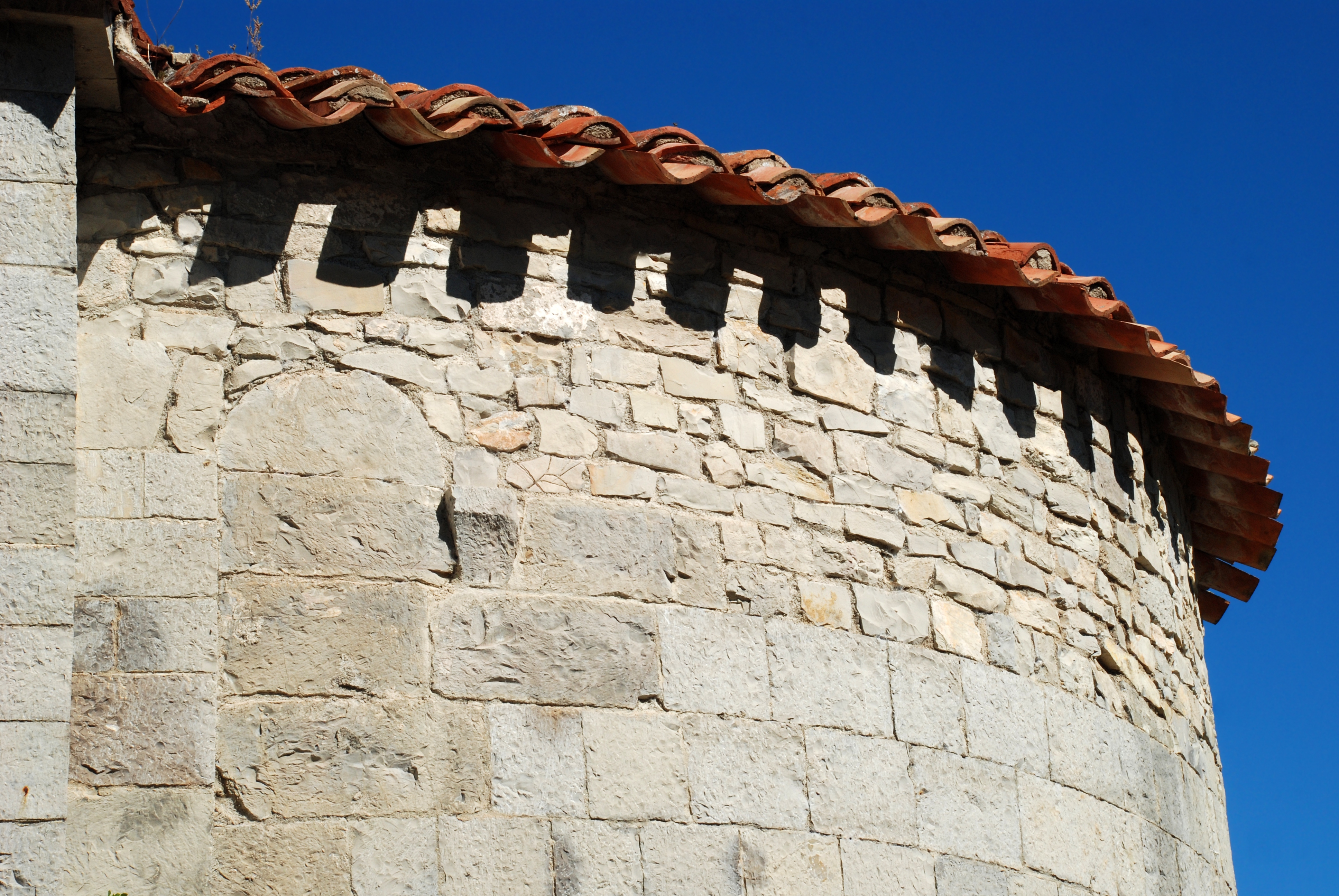 France - Hérault - Brissac - Chapelle Saint-Étienne d'Issensac